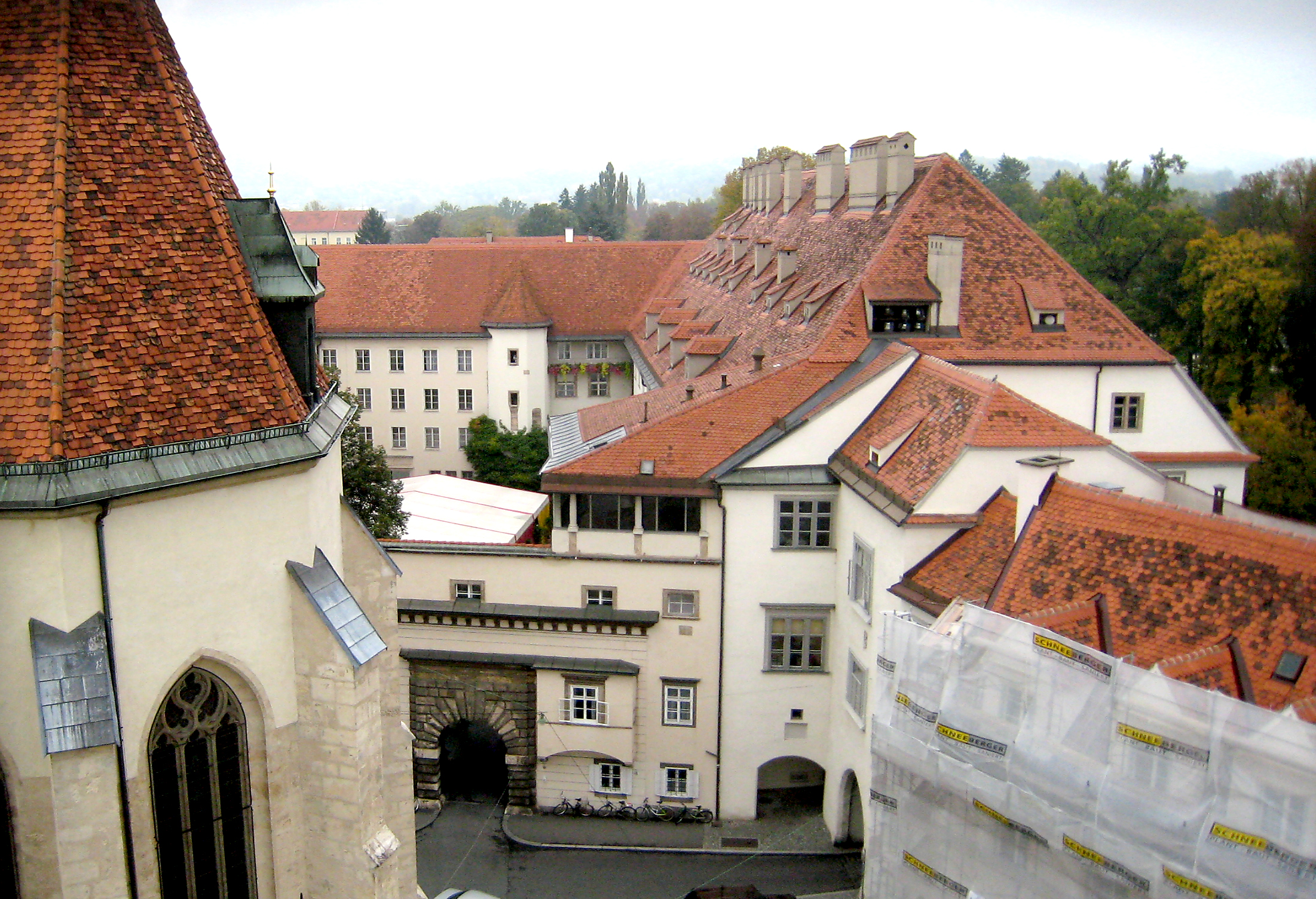 Stadtmauer und Burg